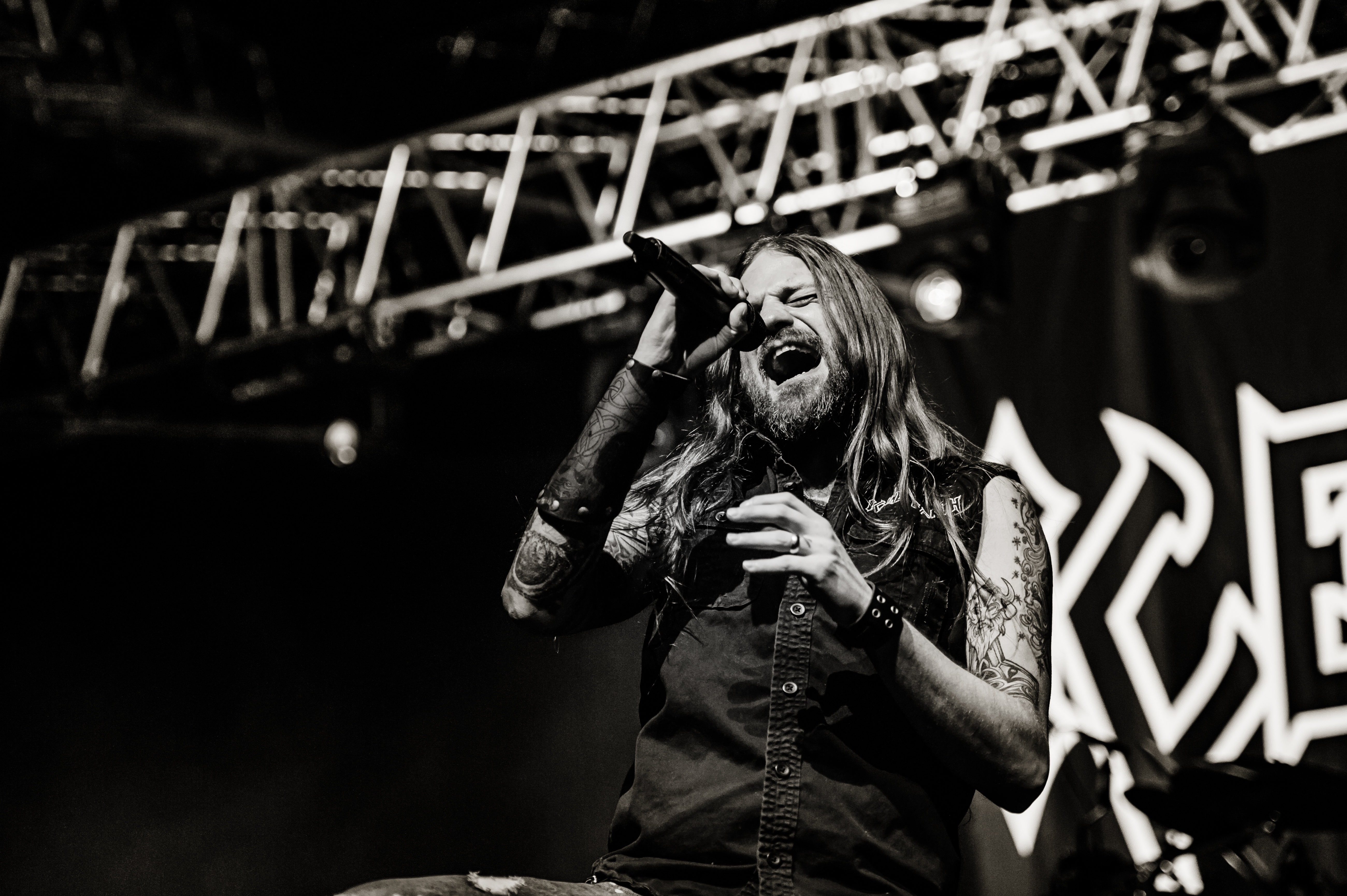 'Ruhrpott Metal Meeting 2016; Oberhausen Turbinenhalle': 'Iced Earth '